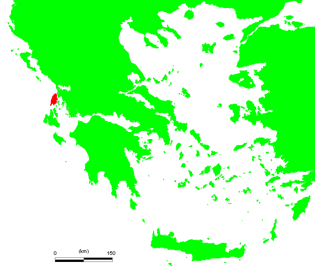 GR Iefkada.PNG (Greek island)